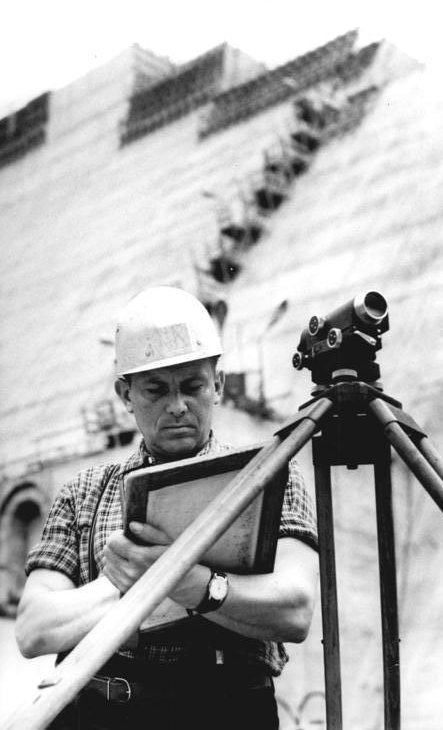 Talsperre Gottleuba, Bauarbeiter mit Nivelliergerät ADN-ZB Häsler-1.7.71--ch Bezirk Dresden: Baustellenkollektive ringen um Plantreue- Vermessungsingenieur Günter Förster nimmt Vermessungsarbeiten an der Talsperre Gottleuba vor. Termintreue ist das Hauptanliegen der Kollektive auf Baustellen an Gewässern im Bezirk Dresden. Auf dieser Grundlage können die Kollegen des Auftraggebers Obere Elbe Dresden und des Spezialbaukombinats Weimar an der Trinkwasssertalsperre Gottleuba eine kontinuierliche Erfüllung aller Wettbewerbsvorhaben melden. Seit Jahresbeginn ließen sie keine Rückstände im Betonierungsprozess zu und wollen den erarbeiteten Planvorsprung noch vergrößern. -c- -c